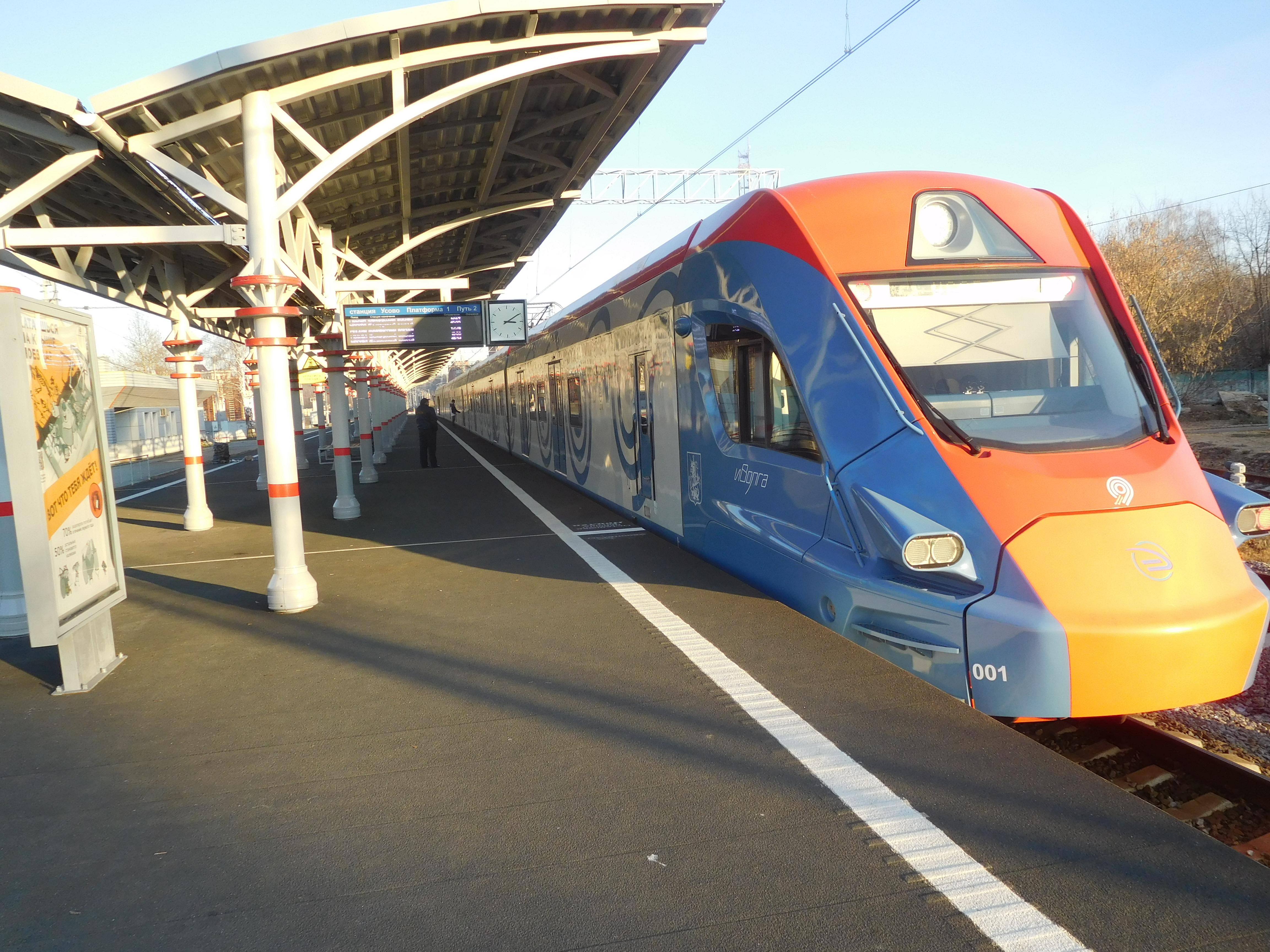 Электропоезд ЭГ2Тв-001 на реконструированной платформе станции Усово